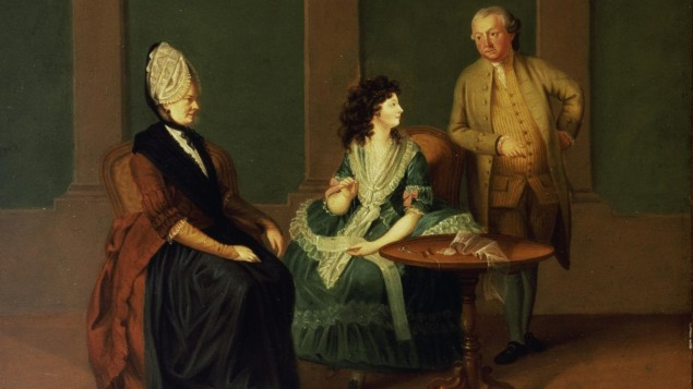 Familienporträt Brentano: Dargestellt sind Sophie von La Roche (1731-1807), ihre Tochter Maximiliane (1756-1793) und Peter Anton Brentano, deren Gatte. Mit der Mutter Sophie, einer vielgelesenen Schriftstellerin, war Goethe seit 1772 bekannt, wahrscheinl. auch mit ihrer schönen ältesten Tochter Max, die 1774 den Kaufmann Brenatano heiratete und die Mutter von Bettina und Clemens Brentano wurde.